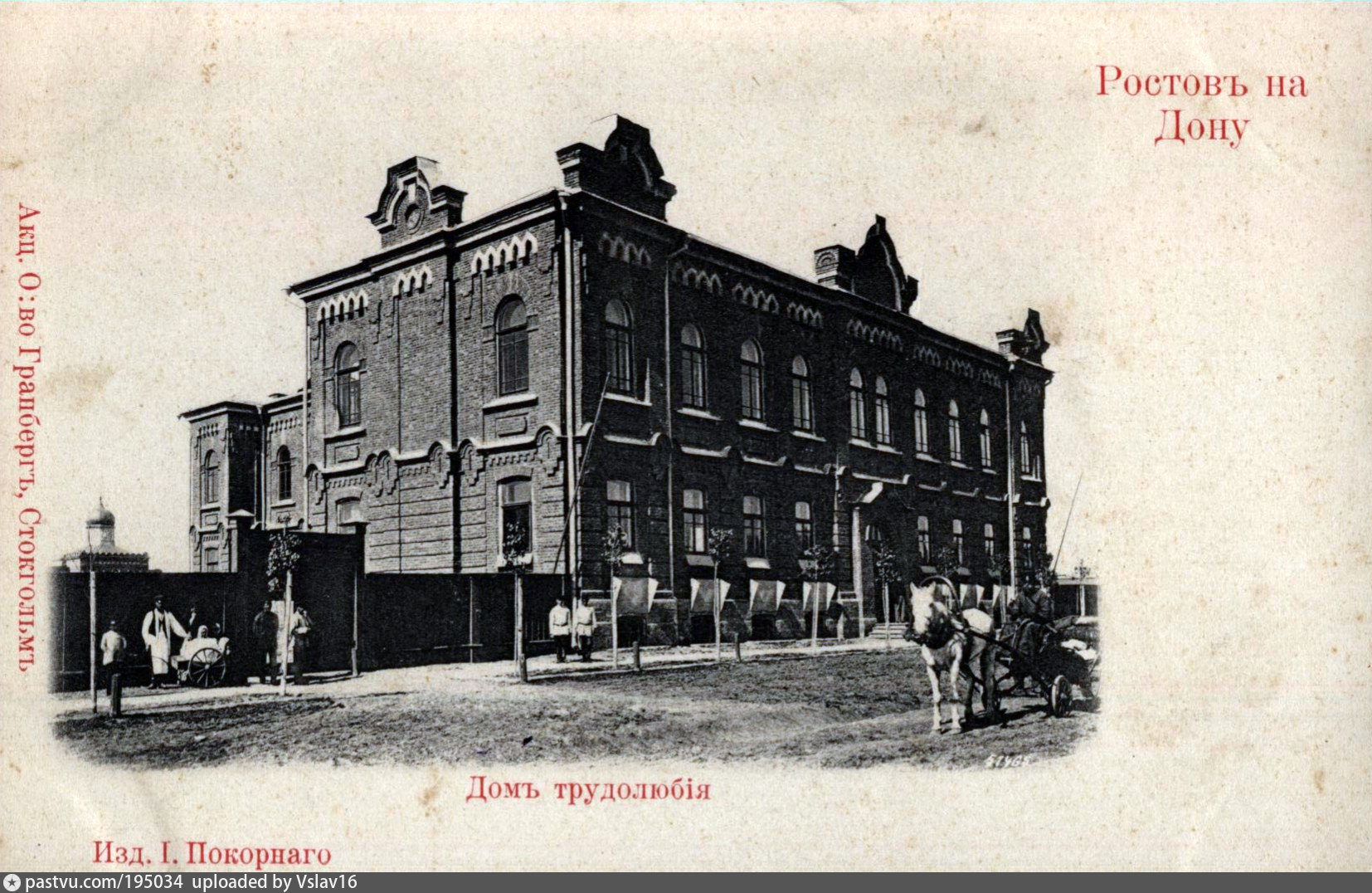 Ростов-на-Дону, Николаевская городская больница